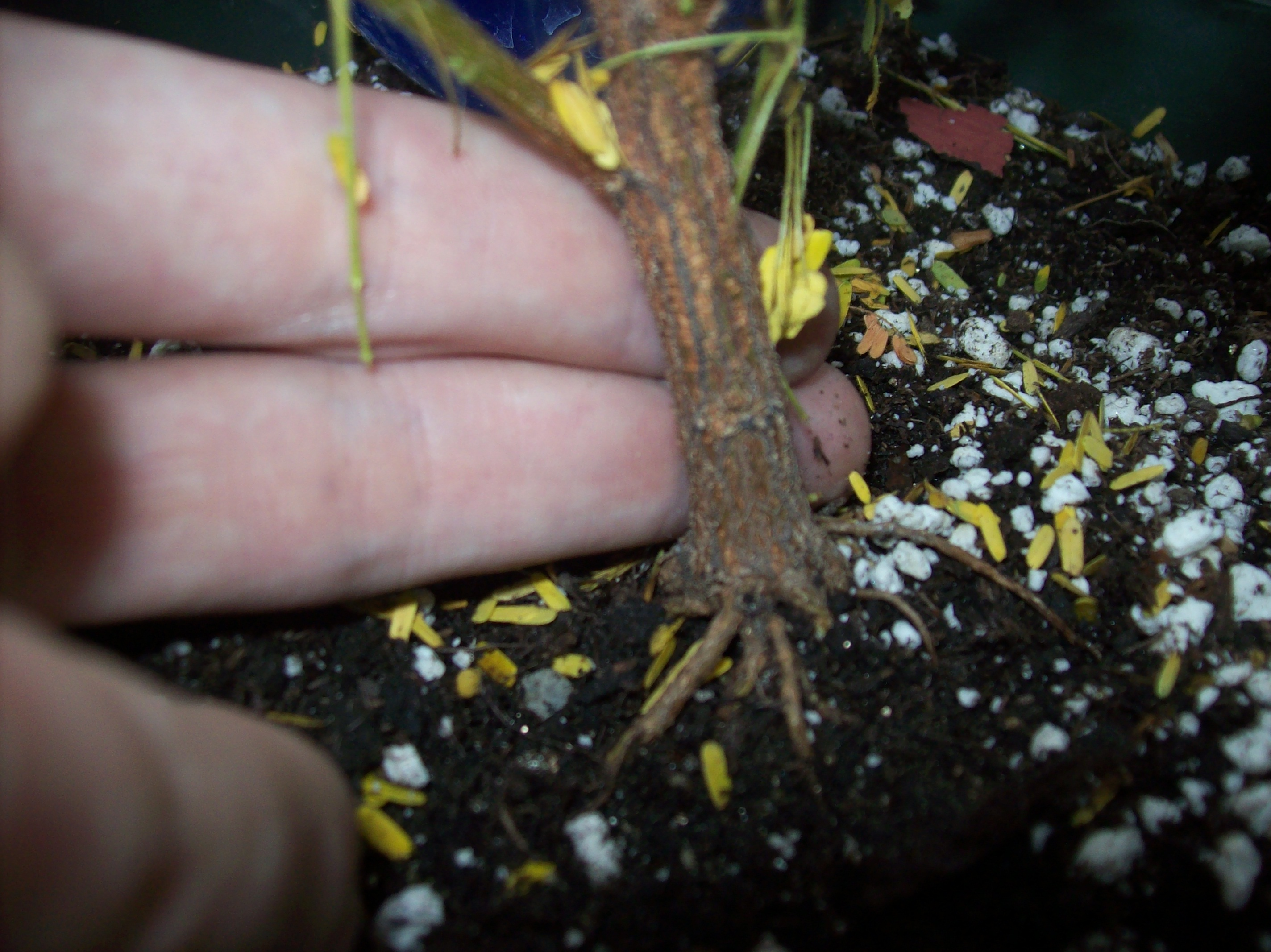 Mimosa tenuiflora, Jurema stem